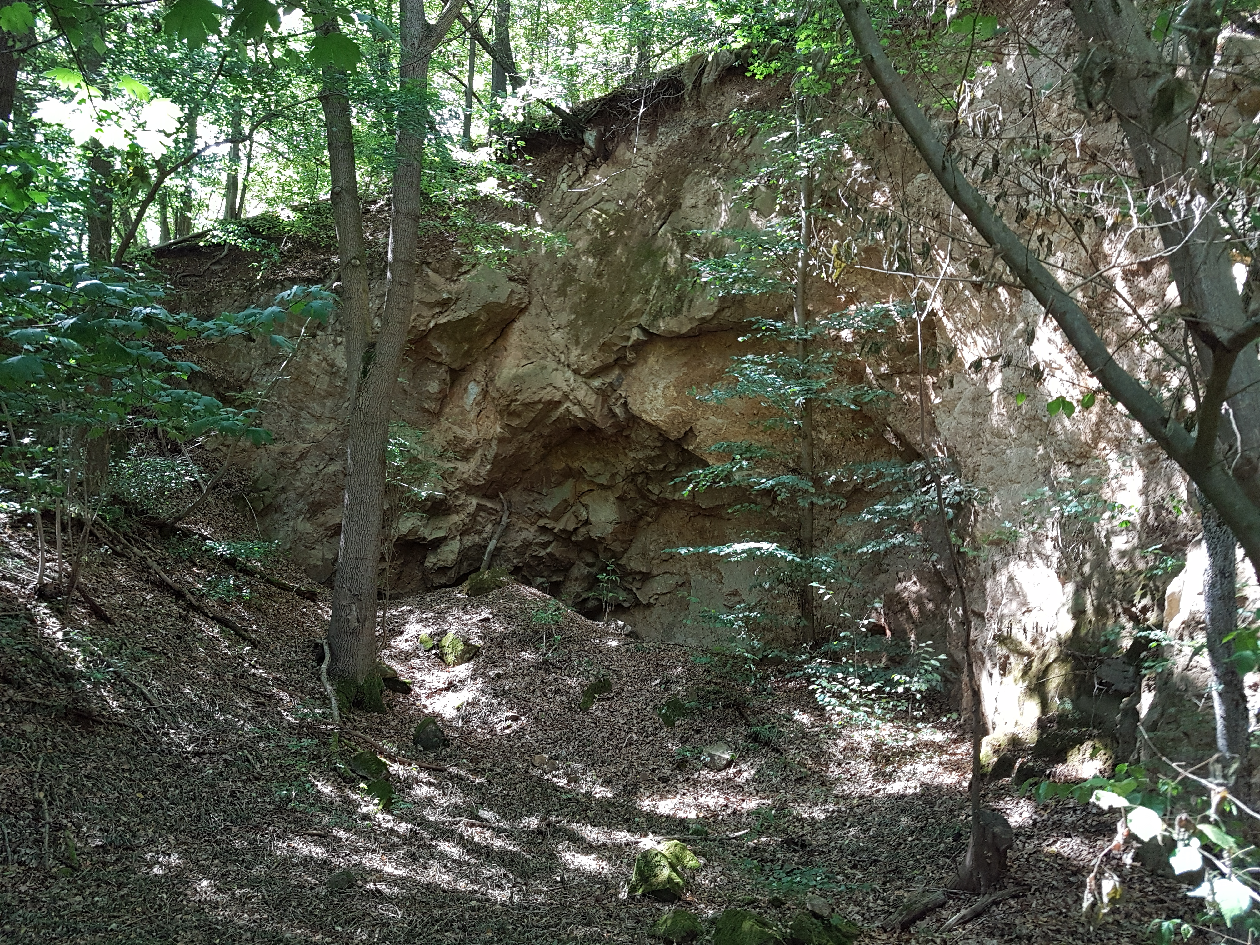 Aufschluss Klusberg